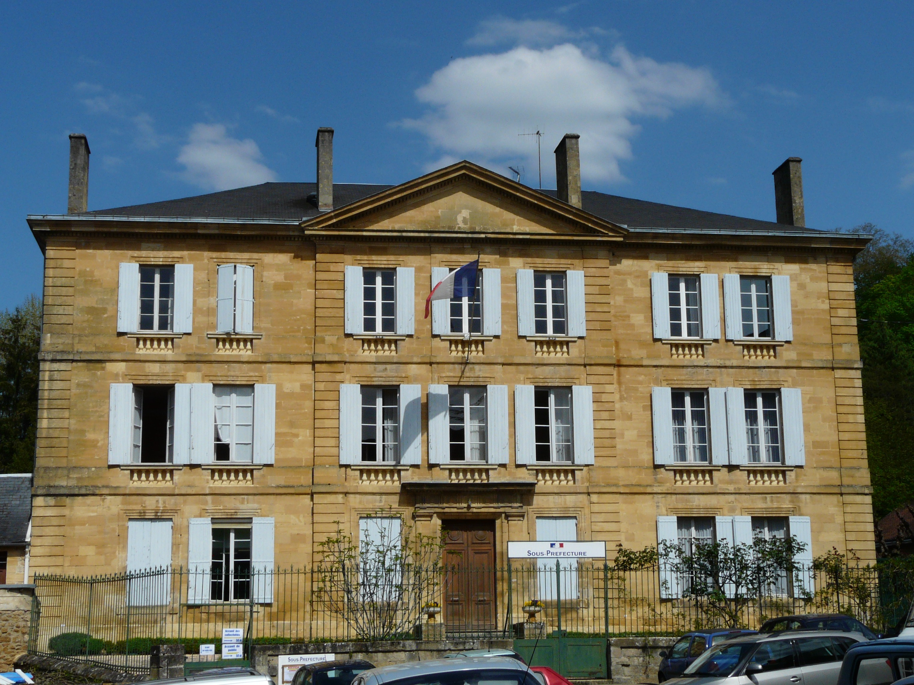 La sous-préfecture de Sarlat-la-Canéda, Dordogne, France.